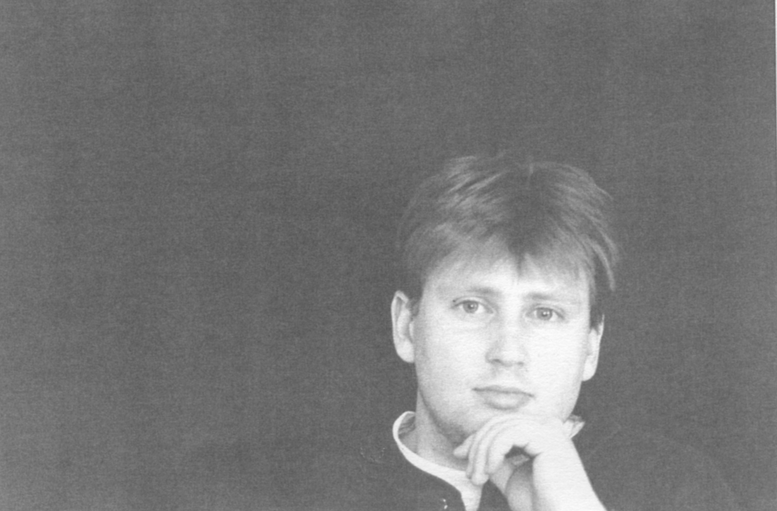 Laurent Poliquin, poète franco-manitobain